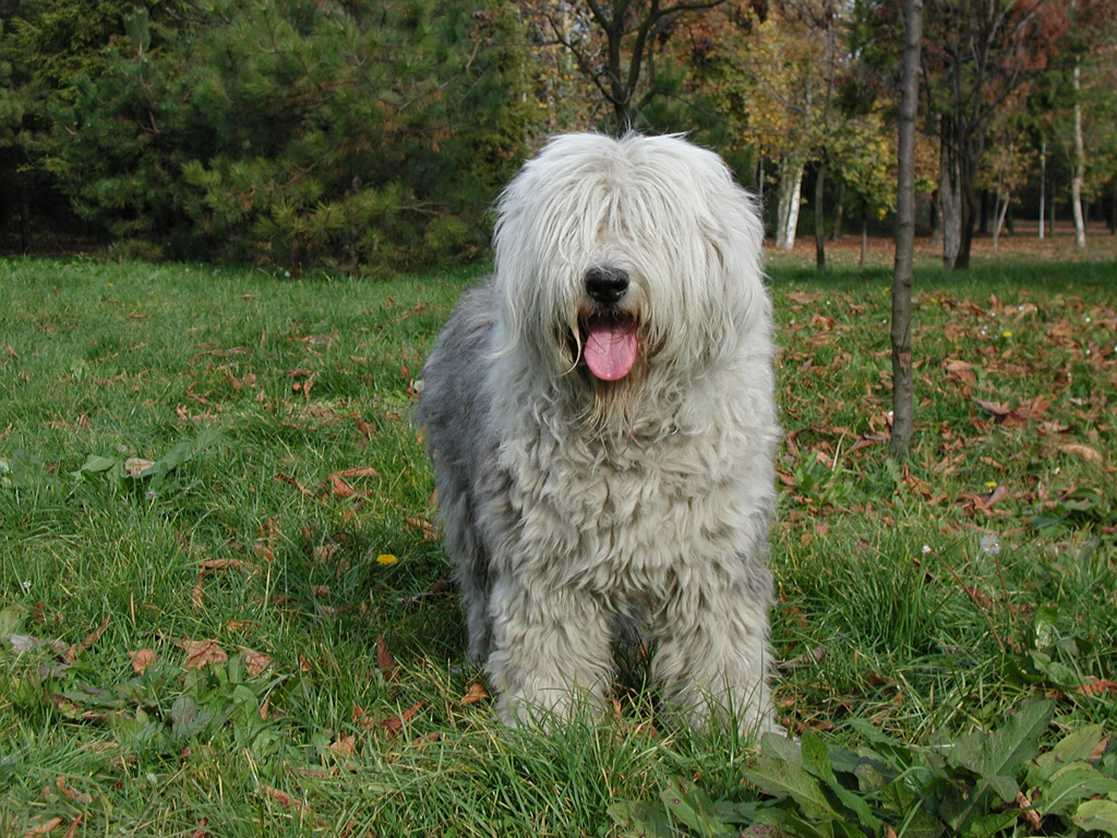 Old English Sheepdog Nebojša